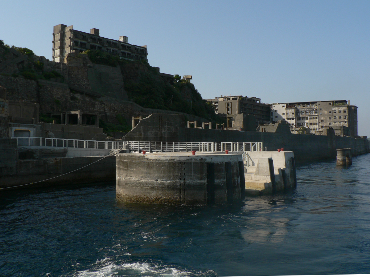 端島(軍艦島)の第3号・ドルフィン桟橋(1962年完成)。第1号は1954年に完成したが、2年後に台風で流失。1958年に完成した第2号も、翌年台風で損壊している。